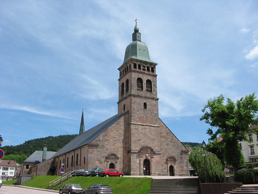 Gérardmer (département des Vosges, France) L'église. Photographie personnelle prise le 7 juin 2006. Copyright © Christian Amet